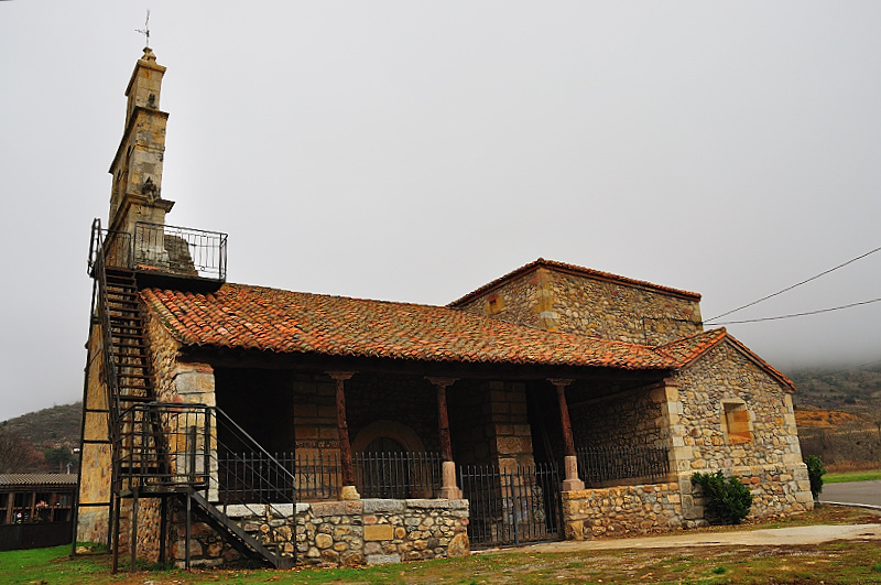 Iglesia de Valdepiélago, en León, España.